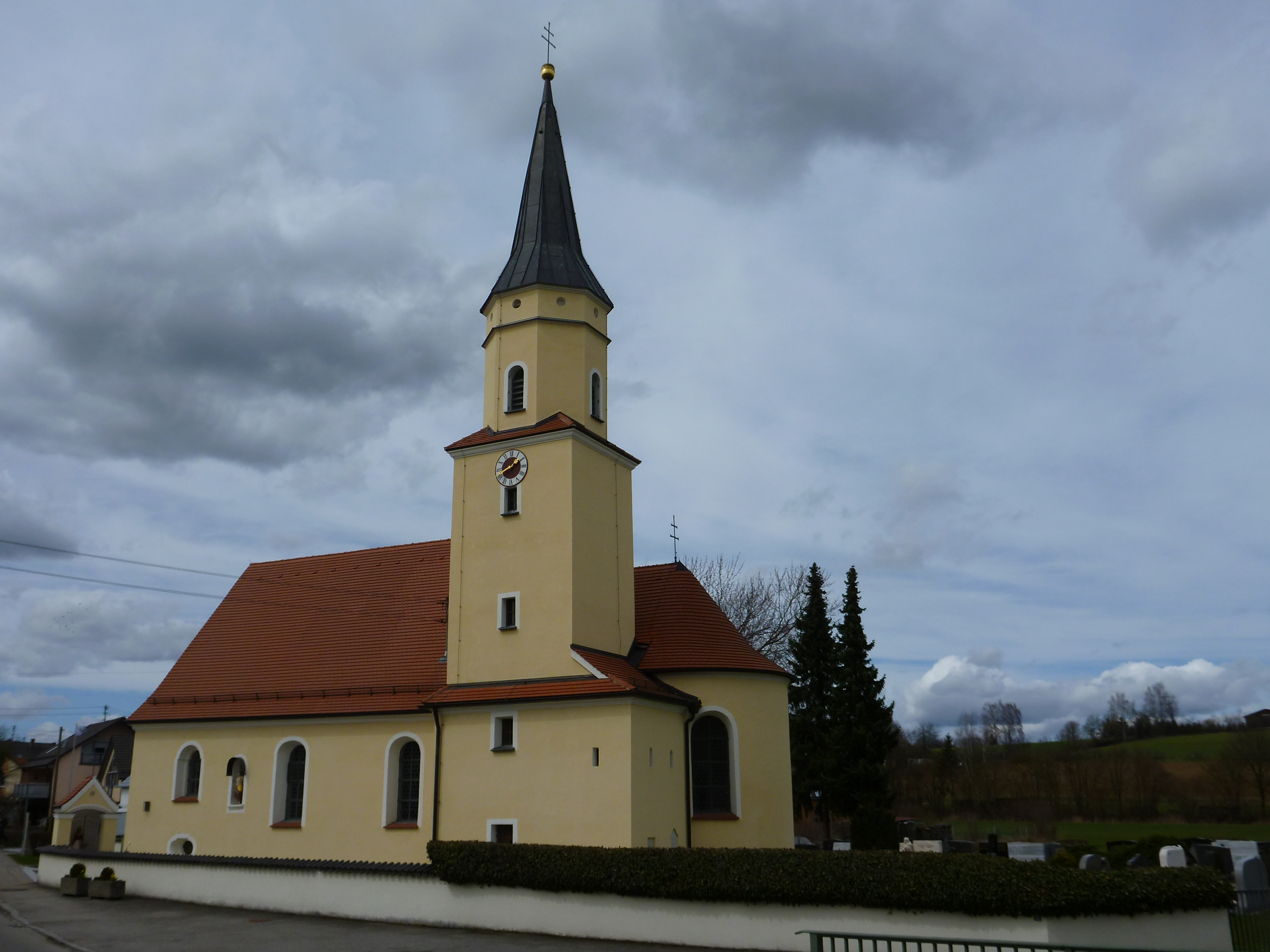 Katholische Pfarrkirche St. Sebastian, Saalbau mit eingezogenem Chor und südlichem Turm mit geknicktem Spitzhelm, barocke Anlage von Valerian Brenner, 1698; mit Ausstattung.